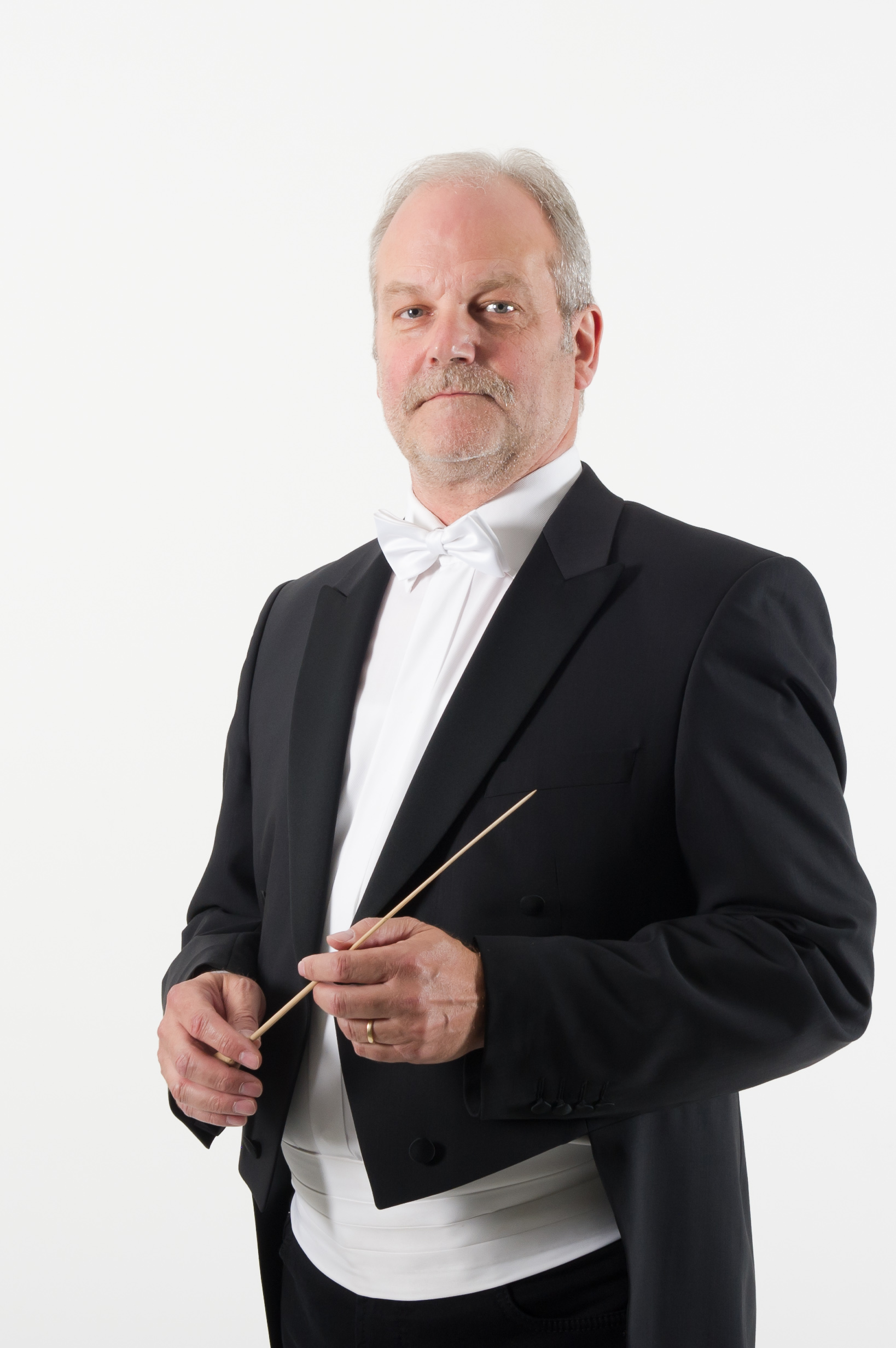 Der Schweizer Orchesterdirigent Manfred Obrecht